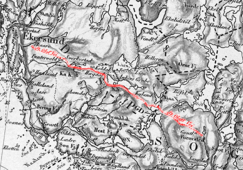 Utsnitt av sydlige deler av Amtskart for Stavanger amt fra 1860. St. Olafs vei er her uthevet med rødt. Den går fra Egersund til Gaudland.